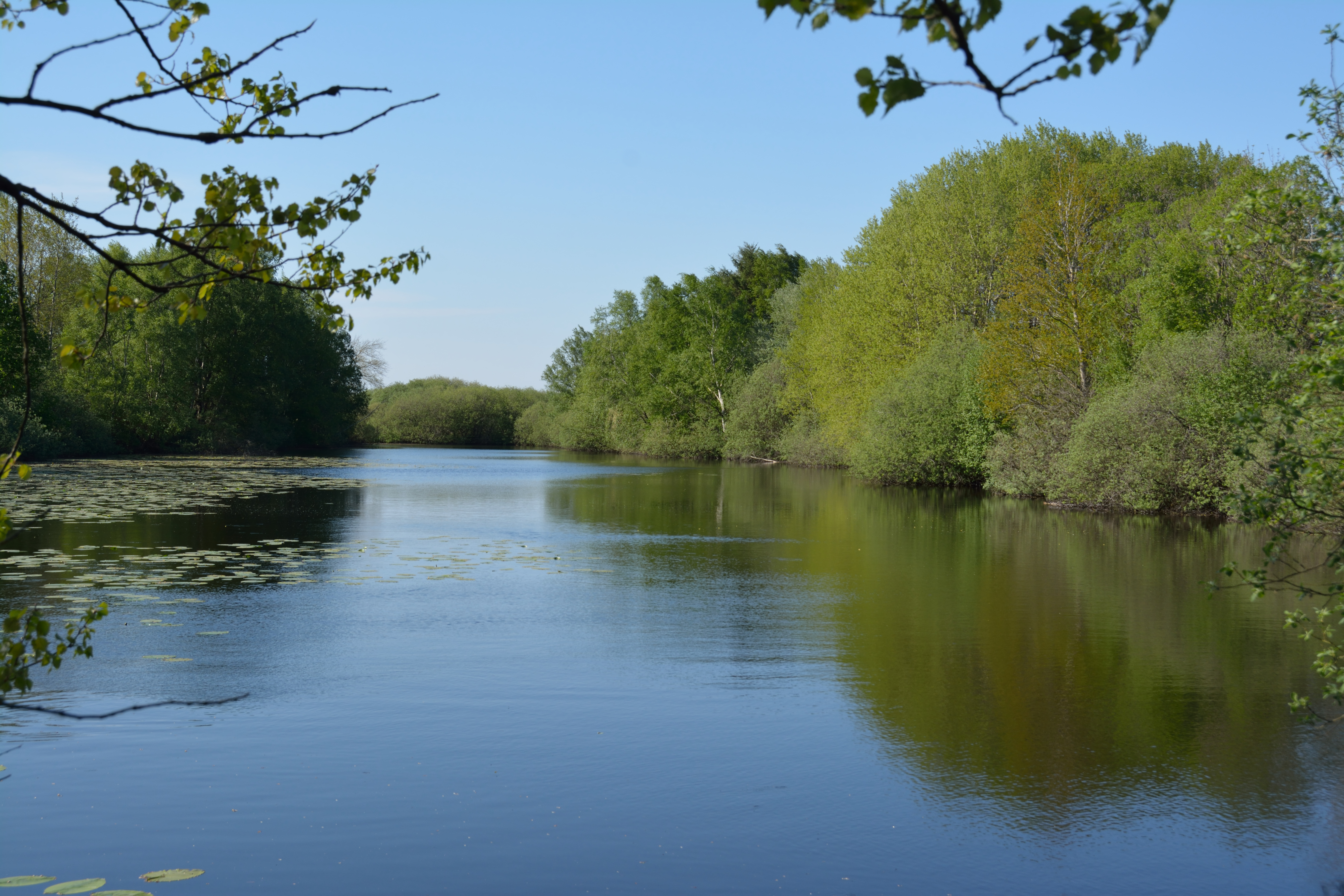 Impressionen aus dem Naturschutzgebiet "Fieler Moor" im Kreis Dithmarschen, Schleswig-Holstein